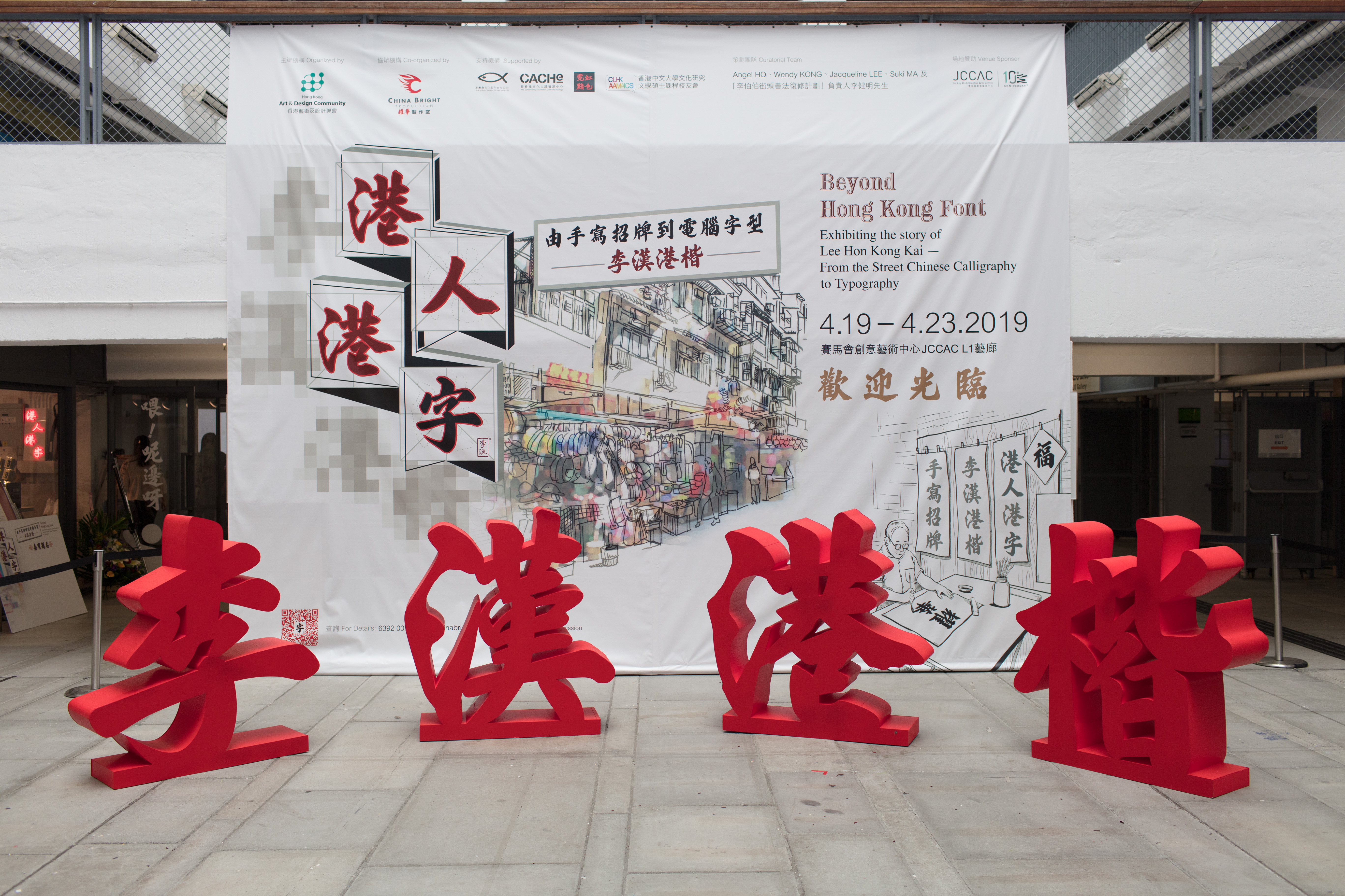 粵語: 港人港字展覽